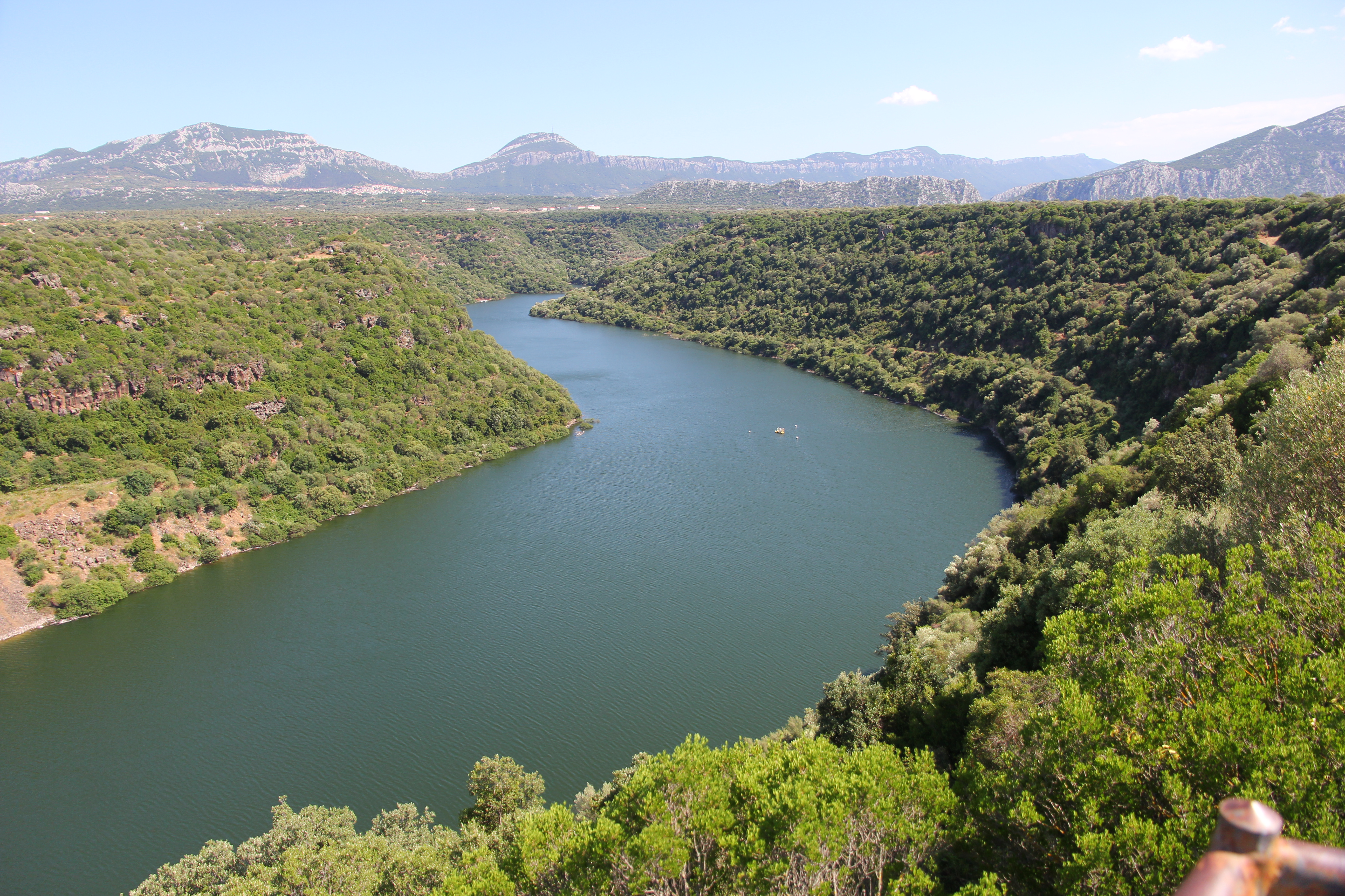 Cala Gonone (Dorgali)